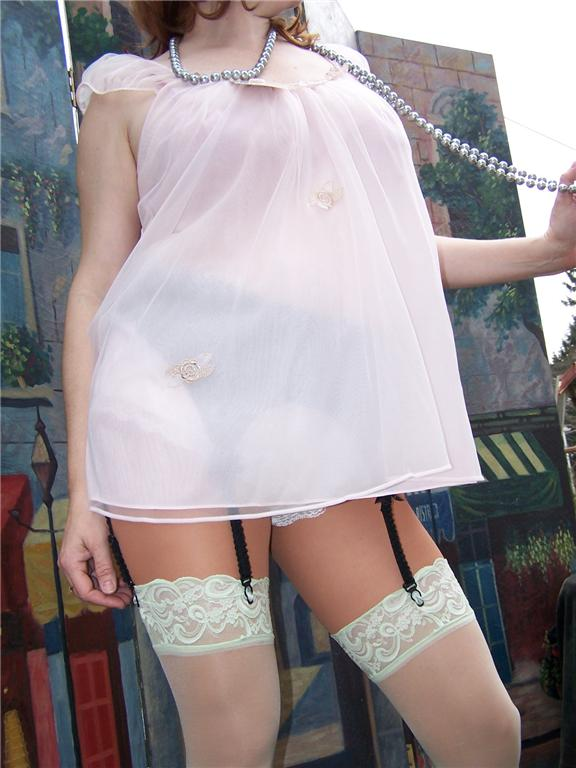 My own work, babydoll nightie